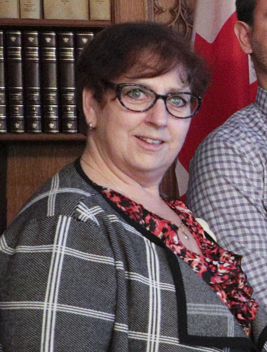 Speaking with victims’ advocates and parents who've lost a loved one on National Day of Remembrance and Action on Violence Against Women yesterday. Senator Boisvenu, Sylvie Boucher and I stand with them and strengthened our resolve to build a society where this type of violence is made history. Hier, Sénateur Boisvenu, Sylvie Boucher et moi avons discuté avec des défenseurs et des parents de victimes en cette Journée nationale de commémoration et d’activités contre la violence faite aux femmes. Nous sommes à leurs côtés et résolus à enrayer ce type de violence.